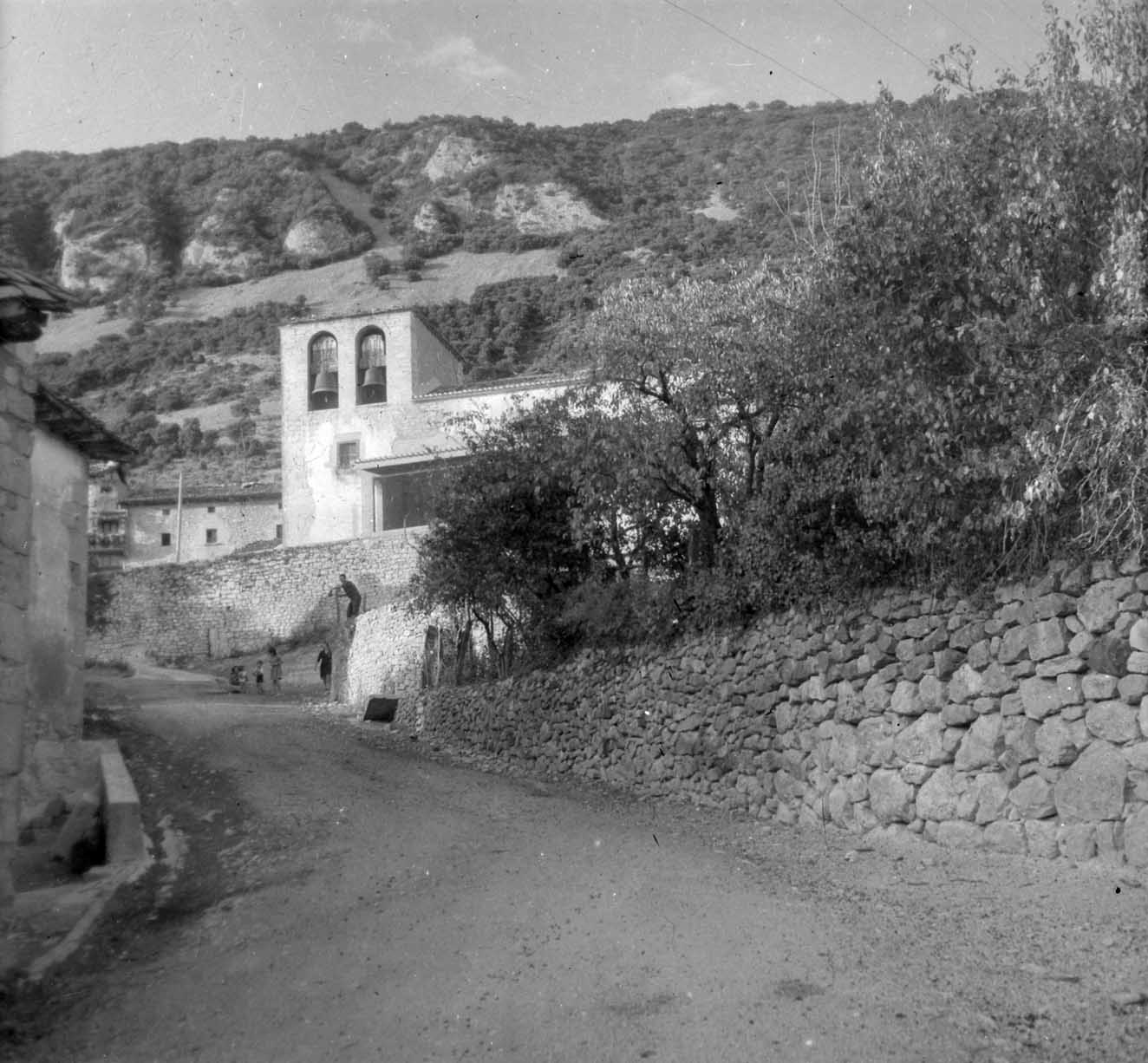 Atondoko herrigunea.